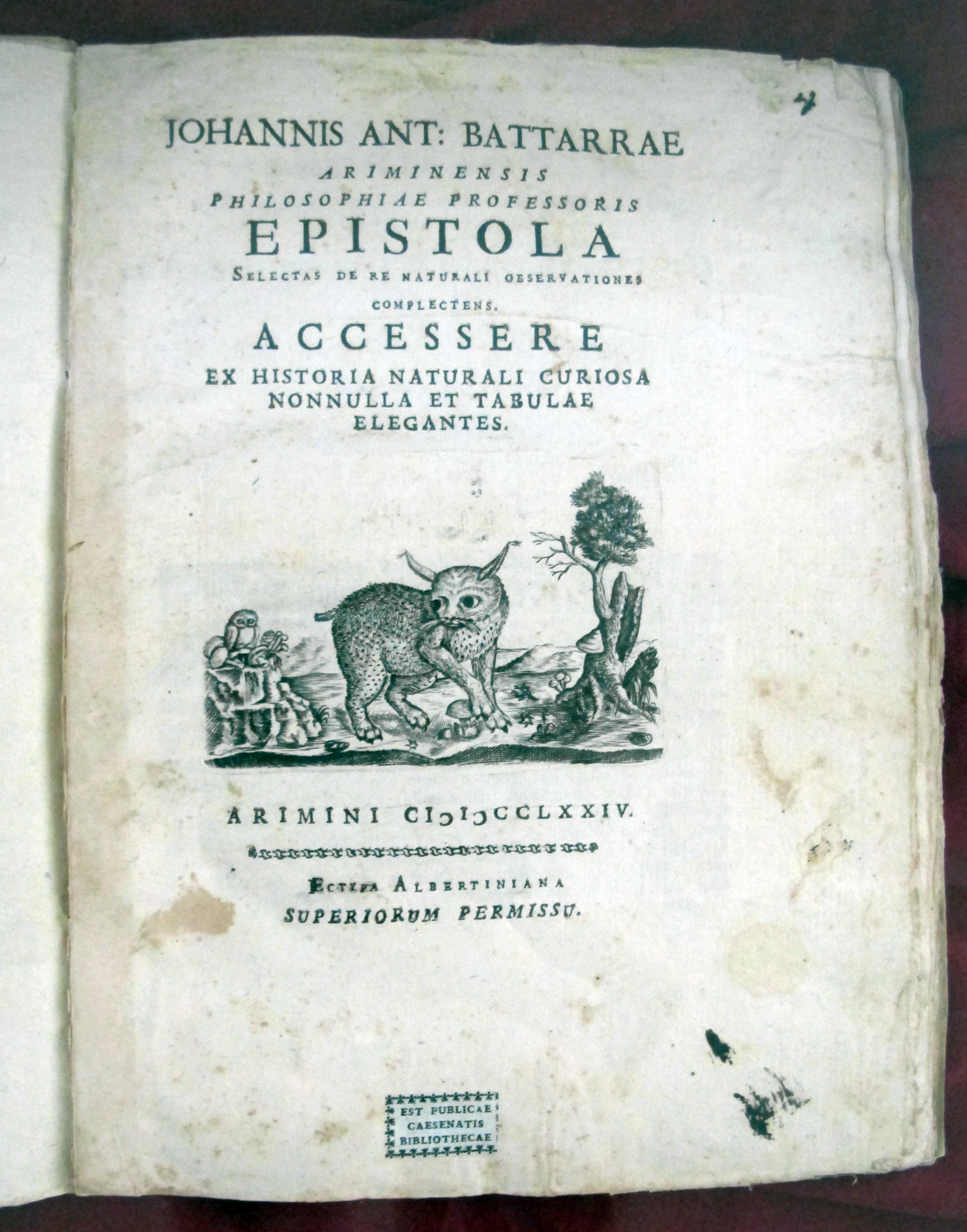 Biblioteca Malatestiana - MIBAC This is a photo of a monument which is part of cultural heritage of Italy.